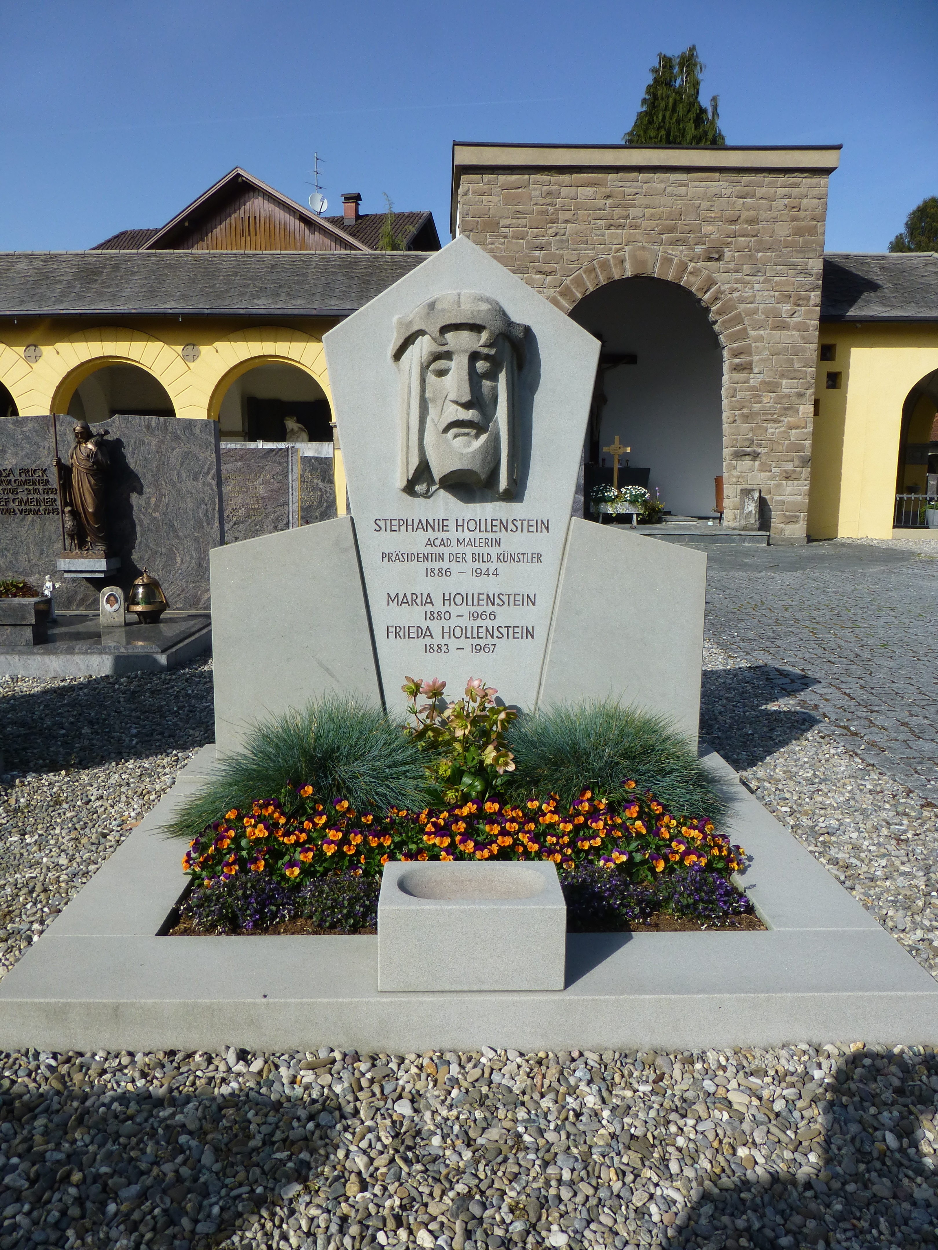 Ehrengrab der Lustenauer Künstlerin und Ehrenringträgerin Stephanie Hollenstein im Friedhof der Pfarre St. Peter und Paul